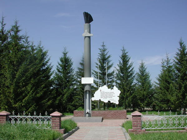 Монумент скважине № 1, давшей начало промышленной добычи нефти в Татарстане. Автор проекта Ульфат Фатахов, установлен 1 октября 1981 г.